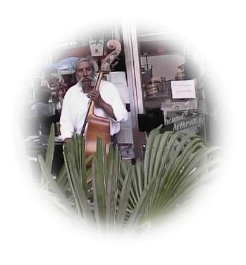 Feckerchilbi, Fest des jenischen Volkes, in Gersau, Schweiz, 2003